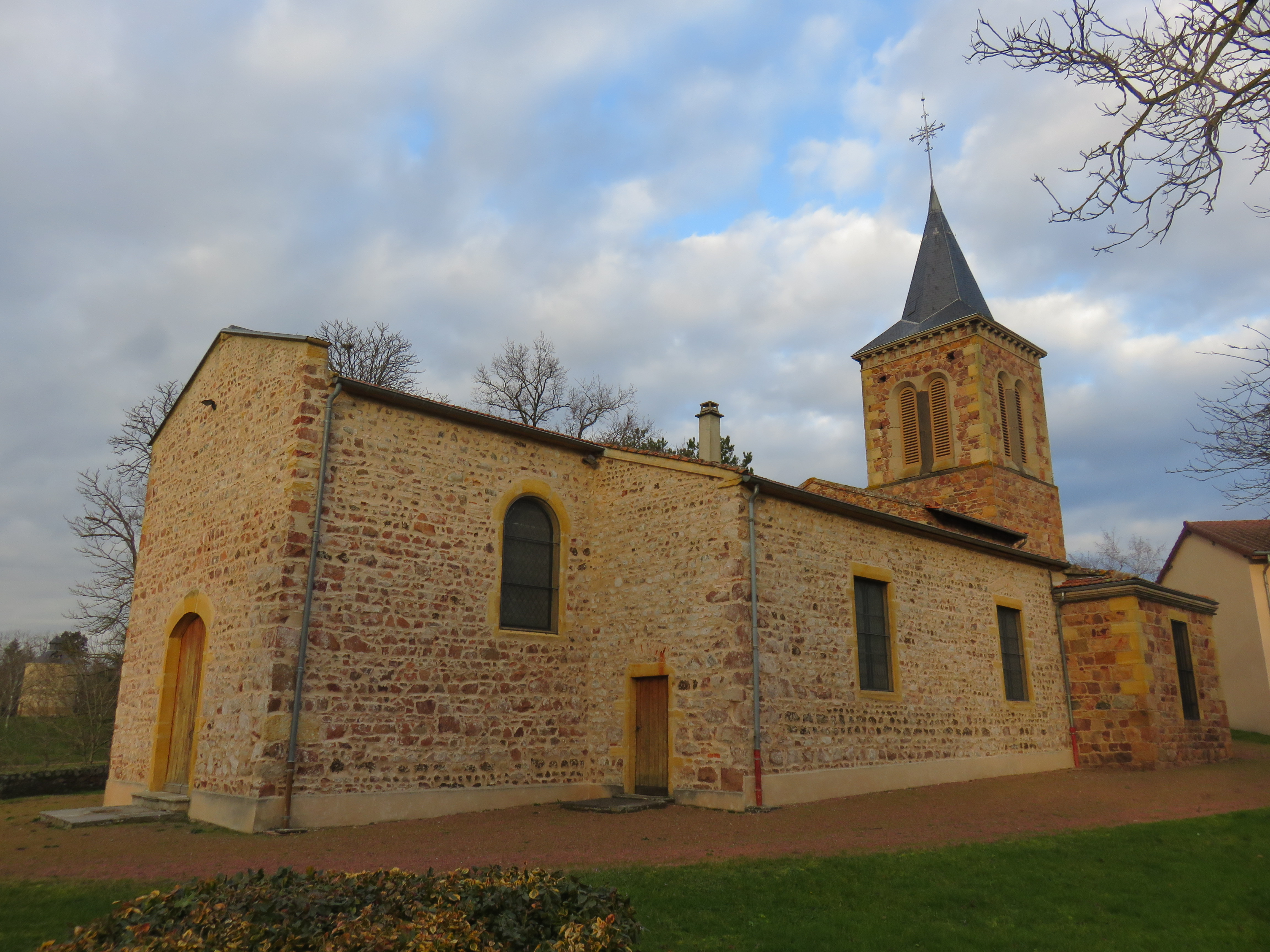 Église Saint-Vincent de Saint-Vincent-de-Boisset (Loire, France) en février 2018.